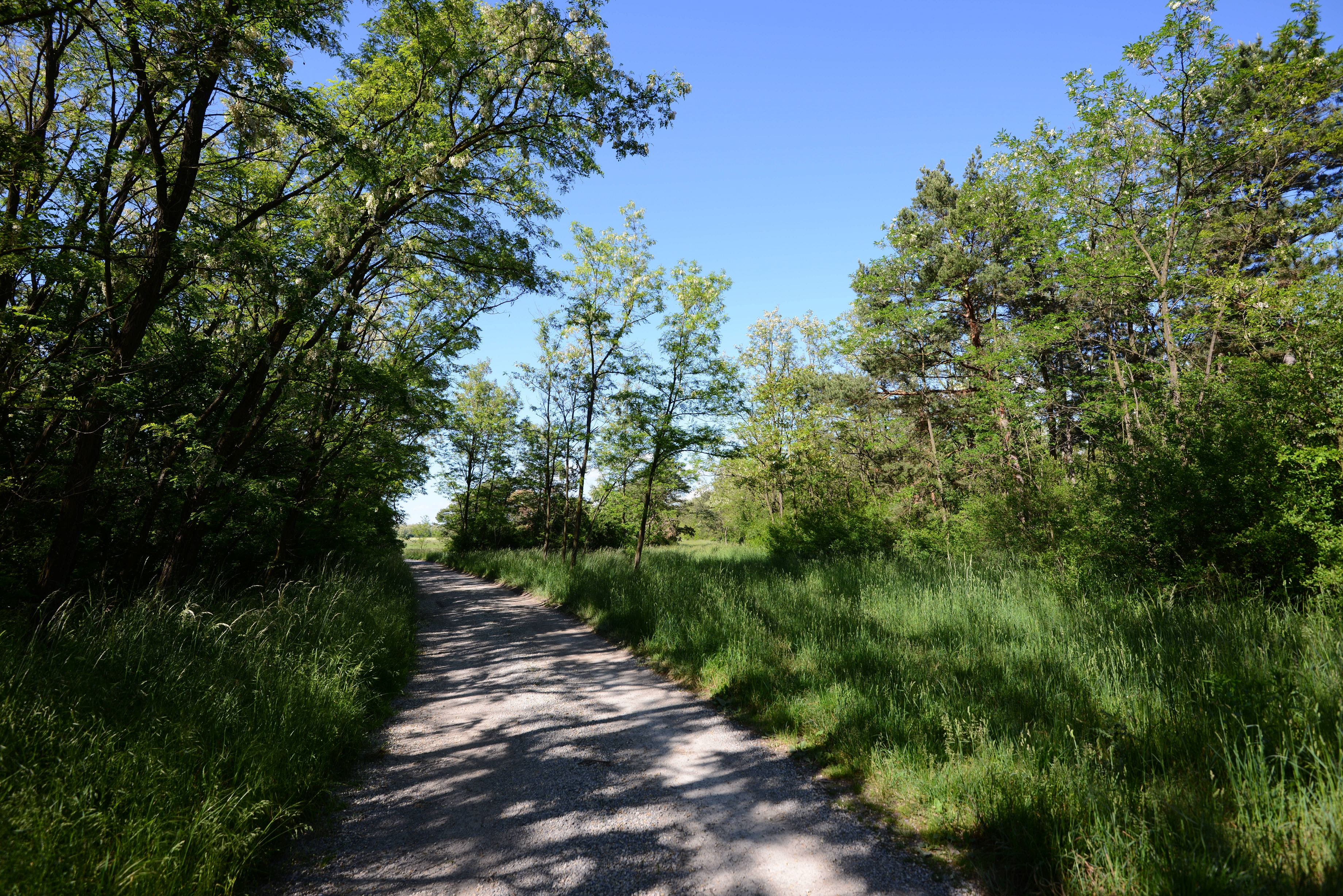 Naturschutzgebiet Weikendorfer Remise, ID 16 This media shows the nature reserve in Lower Austria with the ID 16.